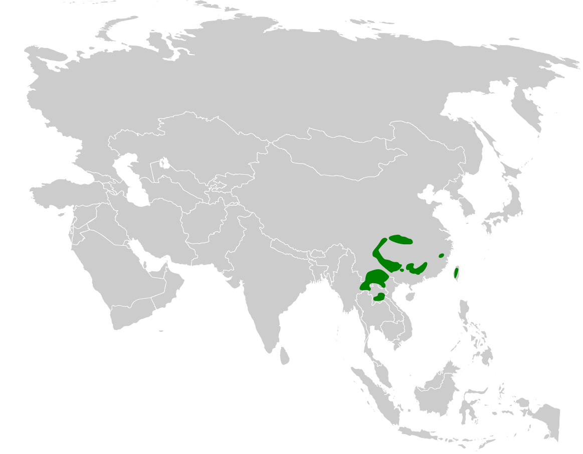 Suthora verreauxi distribution map